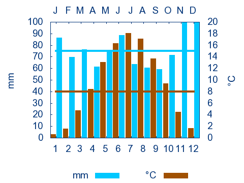 Klimadiagramm